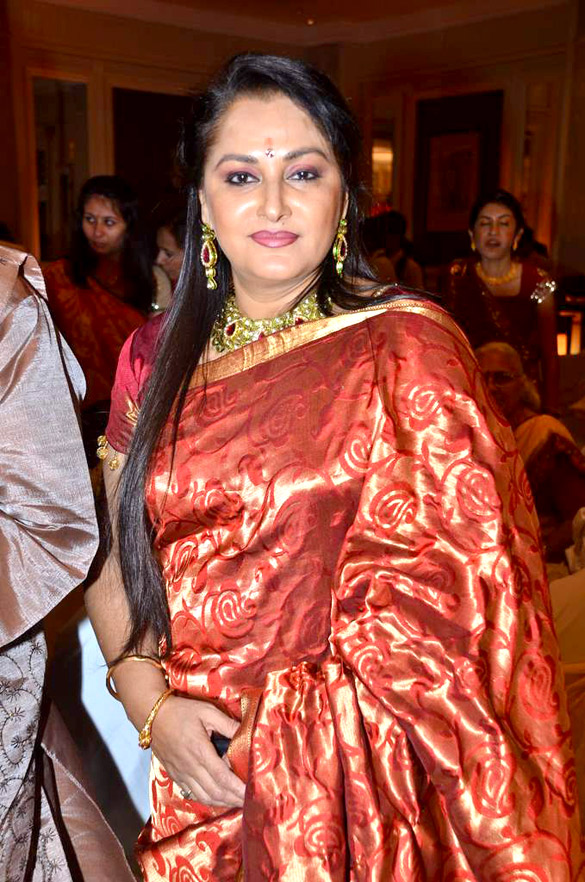 Jaya Prada at wedding of Bappa Lahiri-Taneesha